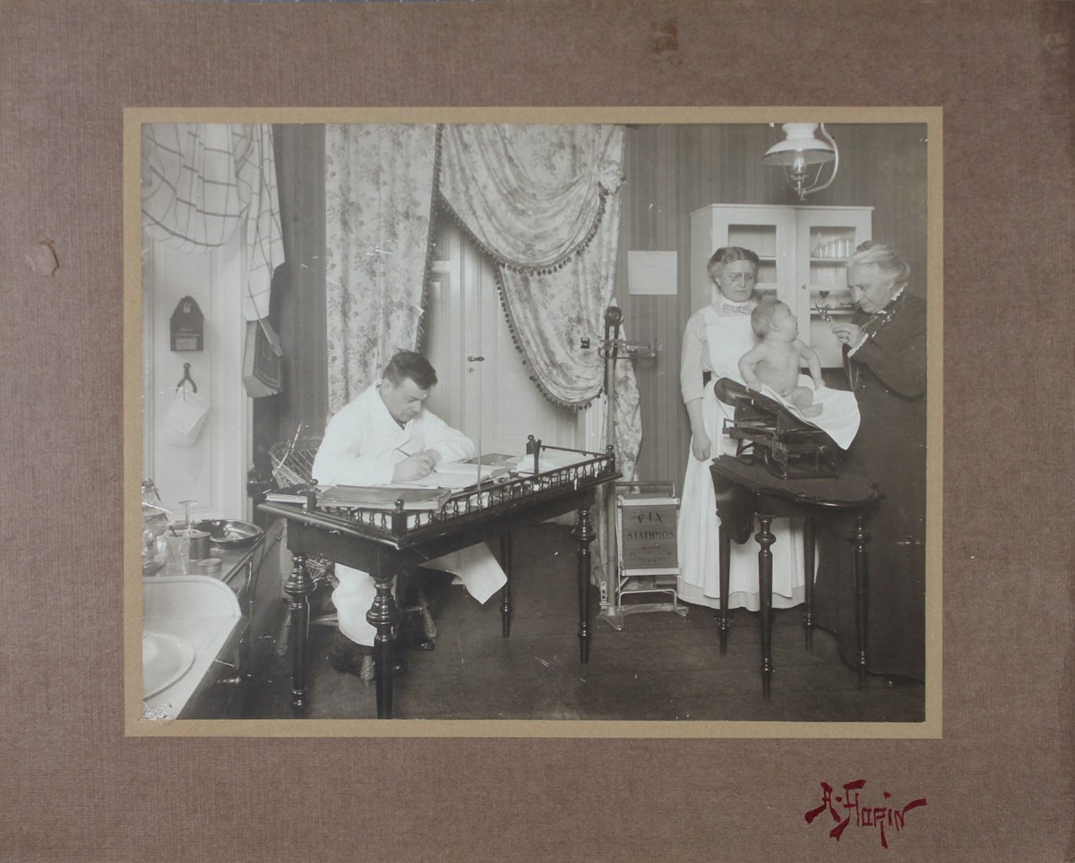 FOTOGRAFIEtt barn undersöks vid Jakob- och Johannes mjölkdroppe. Fotograf Florin, Arvid Skapad 1908 - 1920 Utgiven av - Objekt-ID Stockholms stadsarkiv SE/SSA/0942/Jakob- och Johannes mjölkdroppe H volym 1